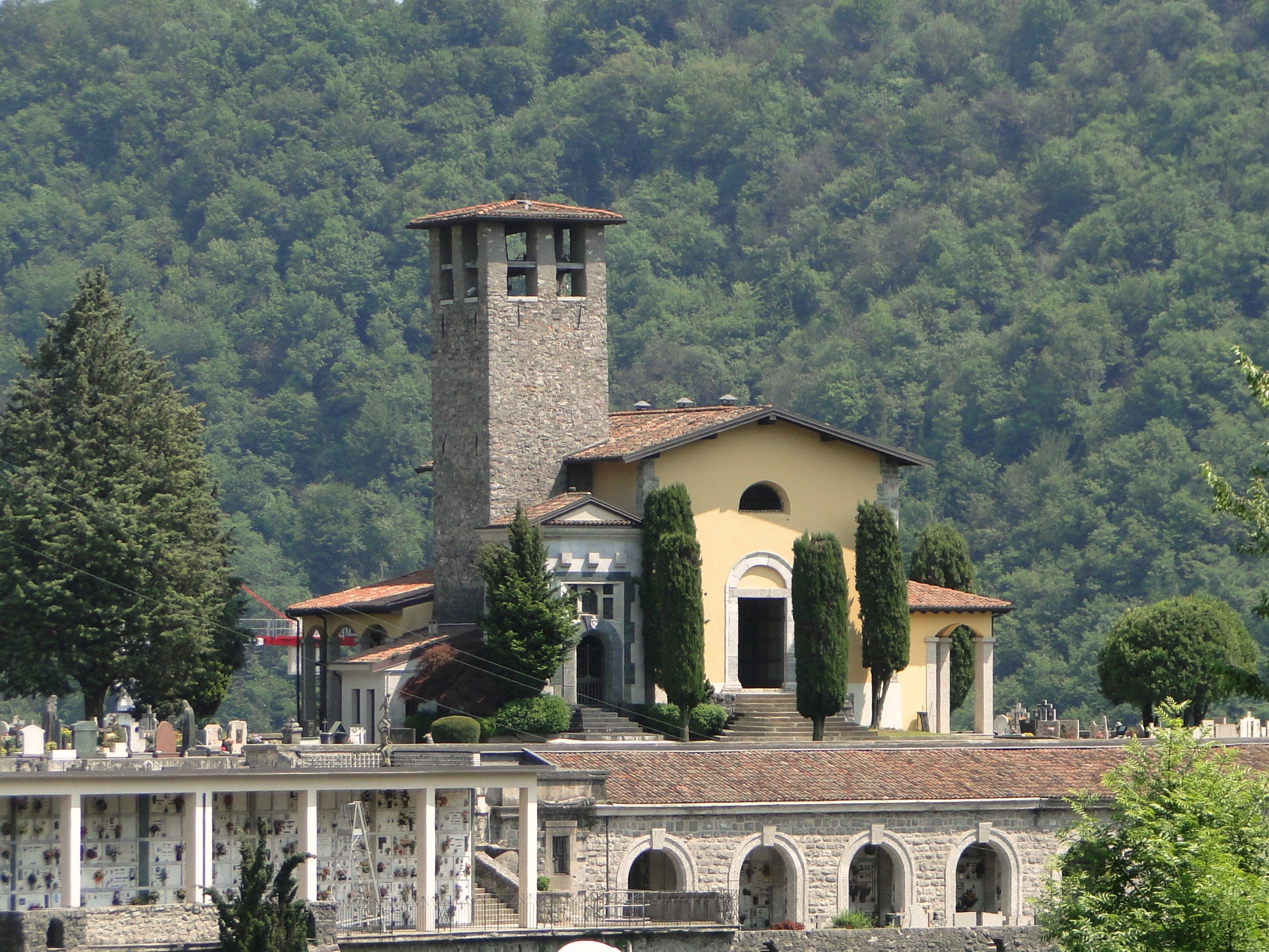 Cimitero e chiesetta di san Carlo. Gazzaniga (BG), Italia